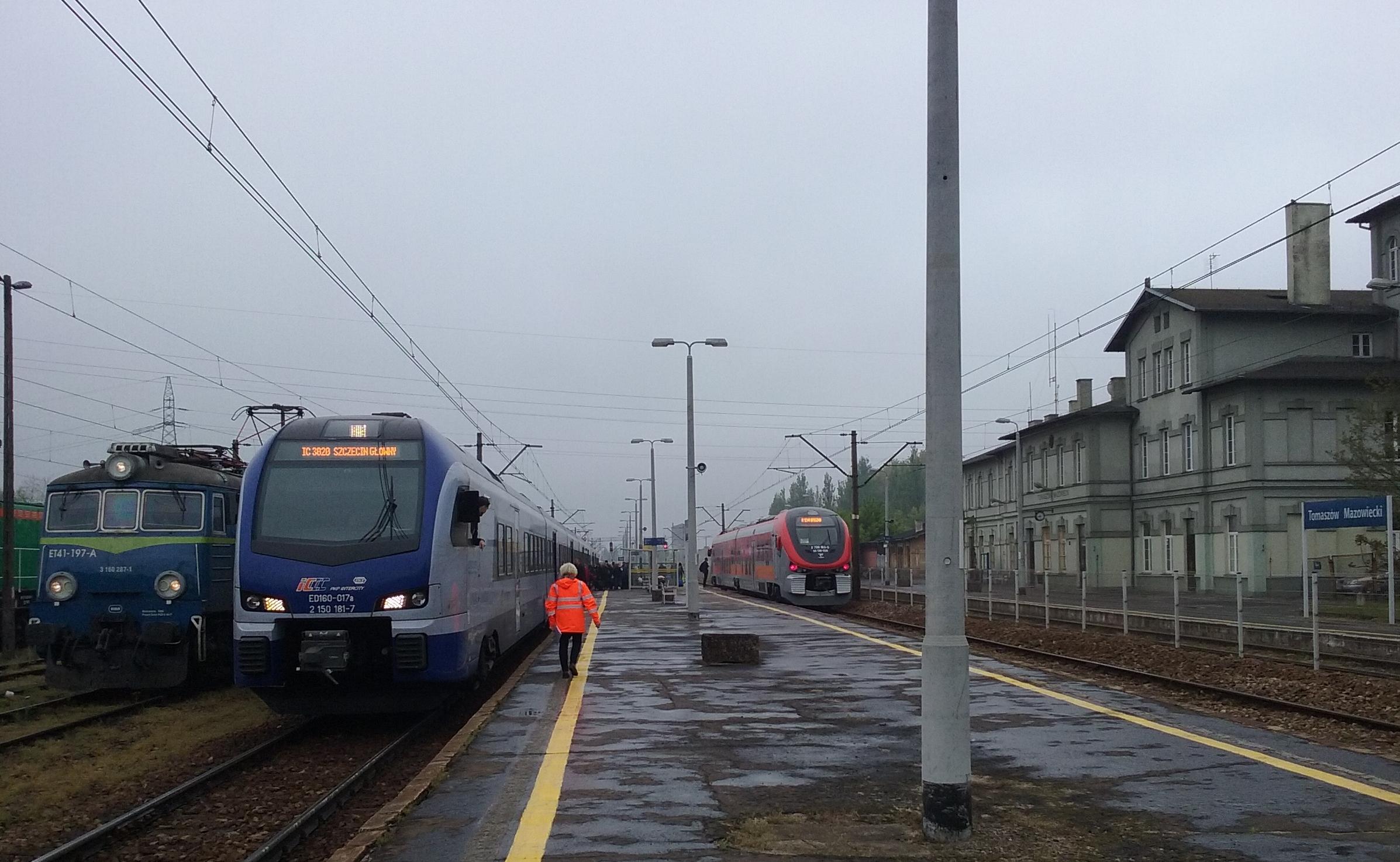 InterCity do Szczecina na dworcu kolejowym w Tomaszowie Mazowieckim